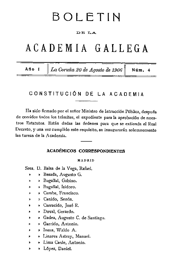 Boletín de la Academia Gallega